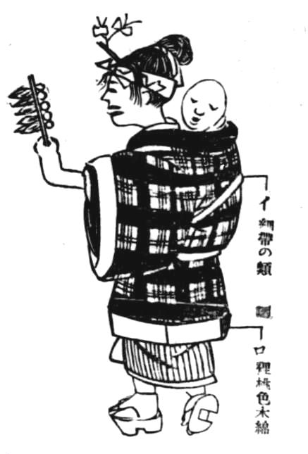 掻巻（かいまき）。ねんねこ半天とも。喜田川季荘著『類聚近世風俗志 : 原名守貞漫稿』より